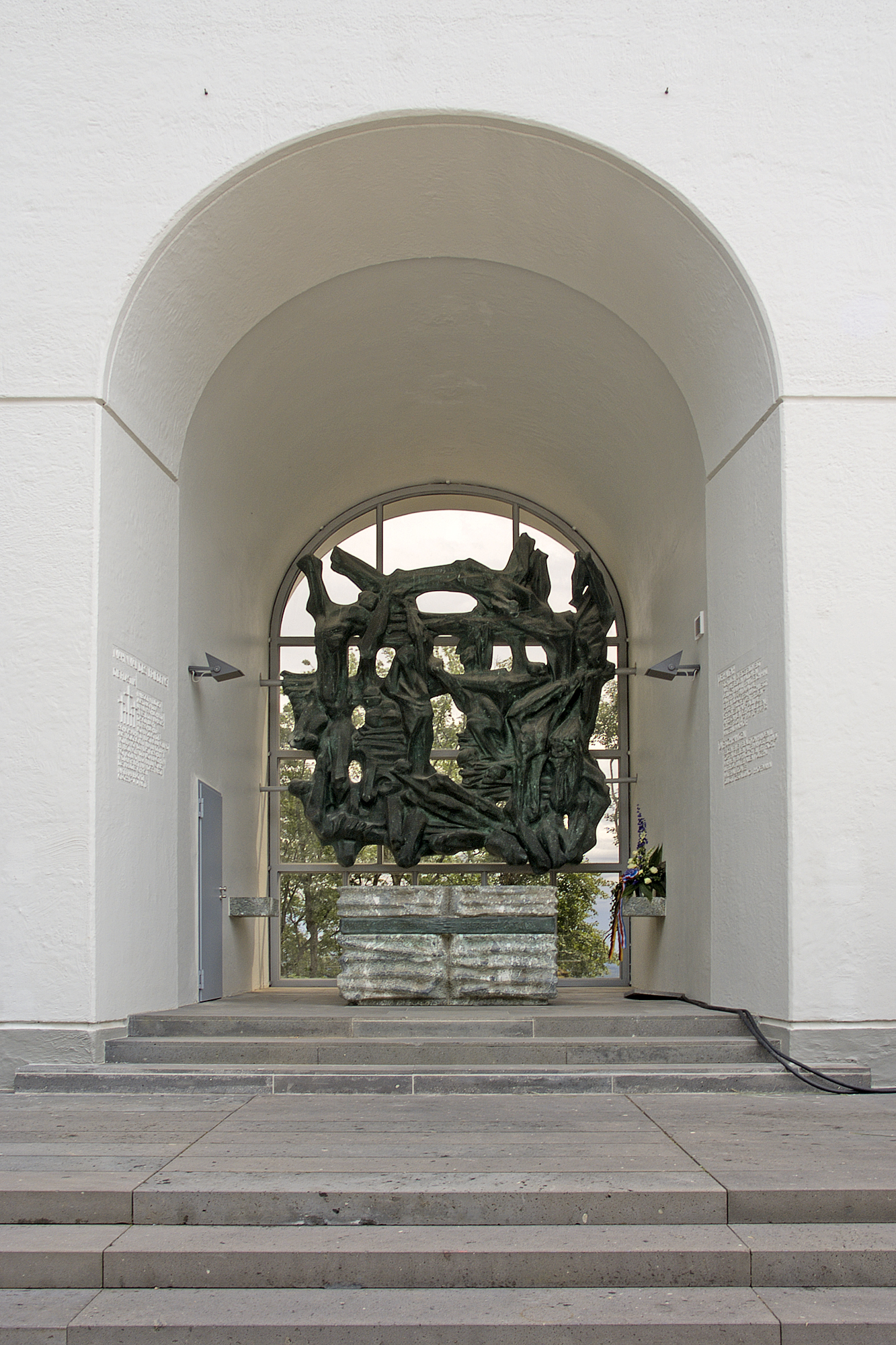 „Mahnmal für den Frieden“ von Richard Hoffmann (Bronze und Marmor, 1976) im Eingangsbereich des Schaumbergturms